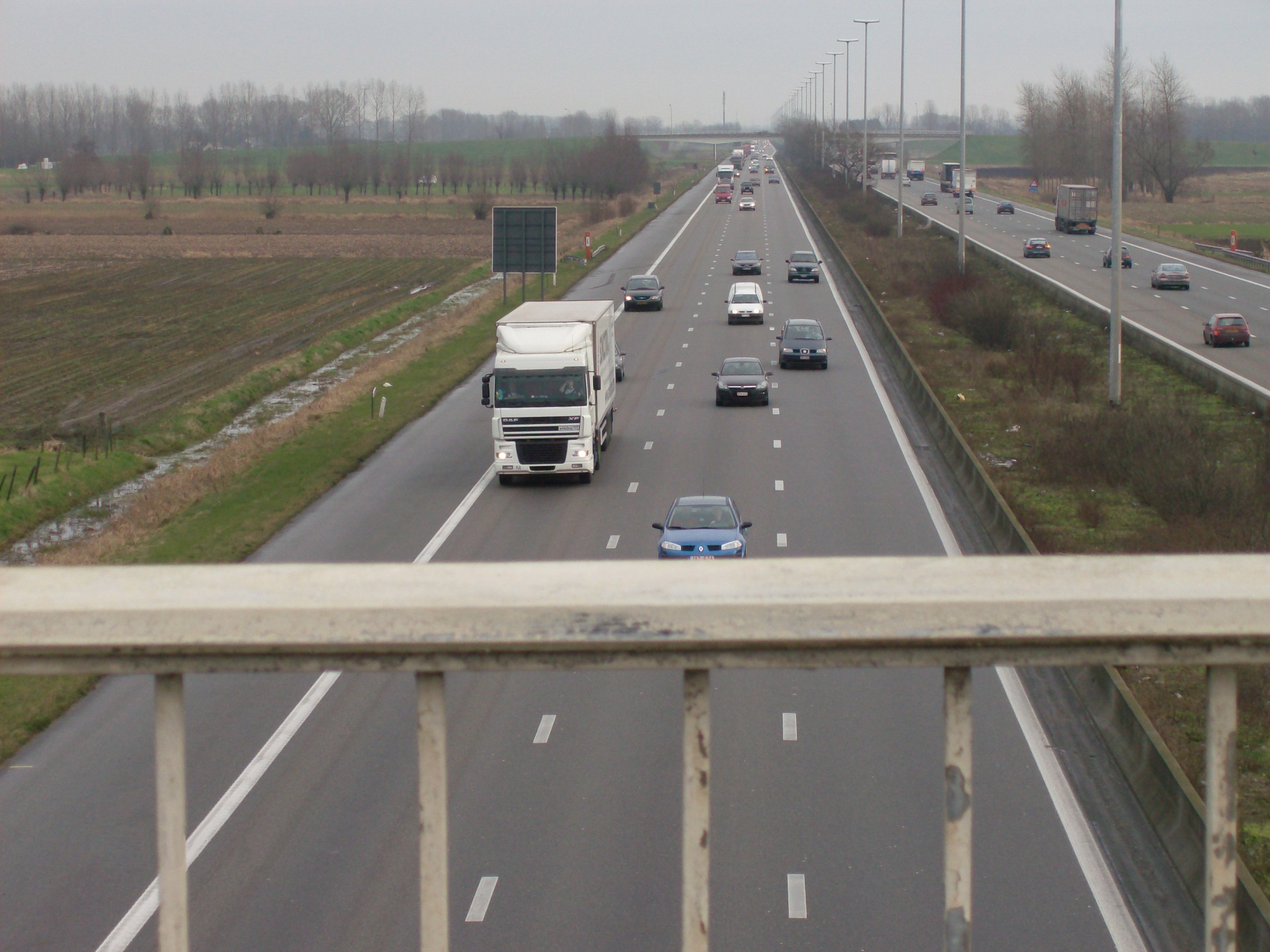 E17 near Lokeren, Belgium